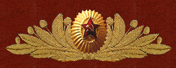 Шитье ген мвд 1969